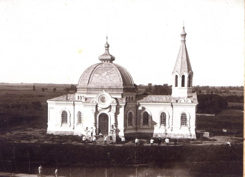 Cerkiew Brygady Straży Pogranicznej p.w. Wprowadzenia Najświętszej Bogurodzicy do Świątyni w Rypinie (1900-1937)